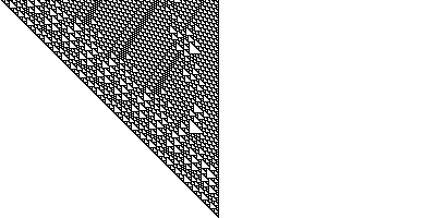 Die ersten 200 Entwicklungsschritte der Regel 110 des Stephen Wolfram Zellularautomaten